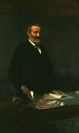 Ritratto di Quintino Sella.